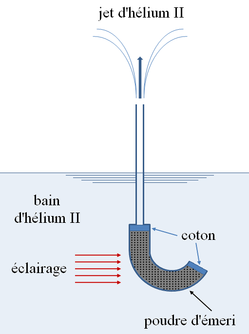 Représentation schématique de l'effet fontaine observé dans l'hélium II superfluide